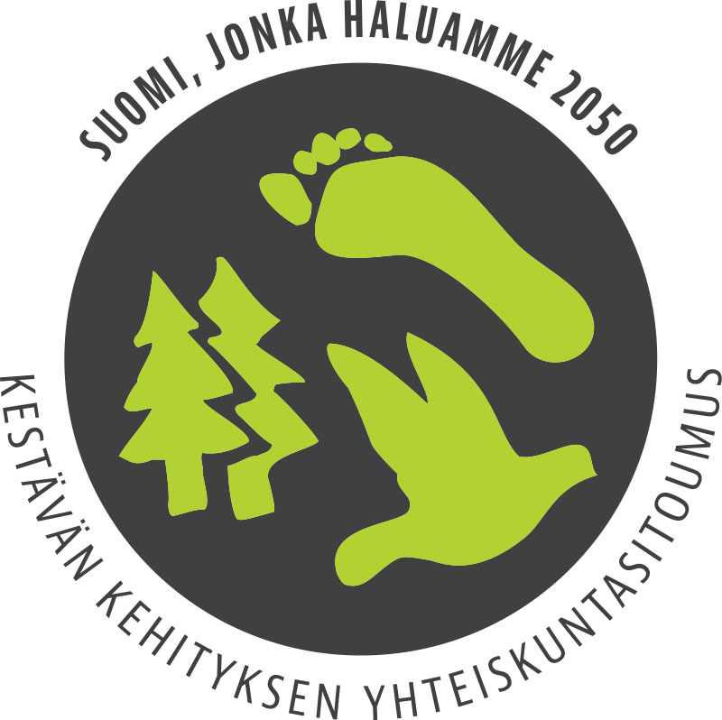 Kestävän kehityksen yhteiskuntasitoumus 2050